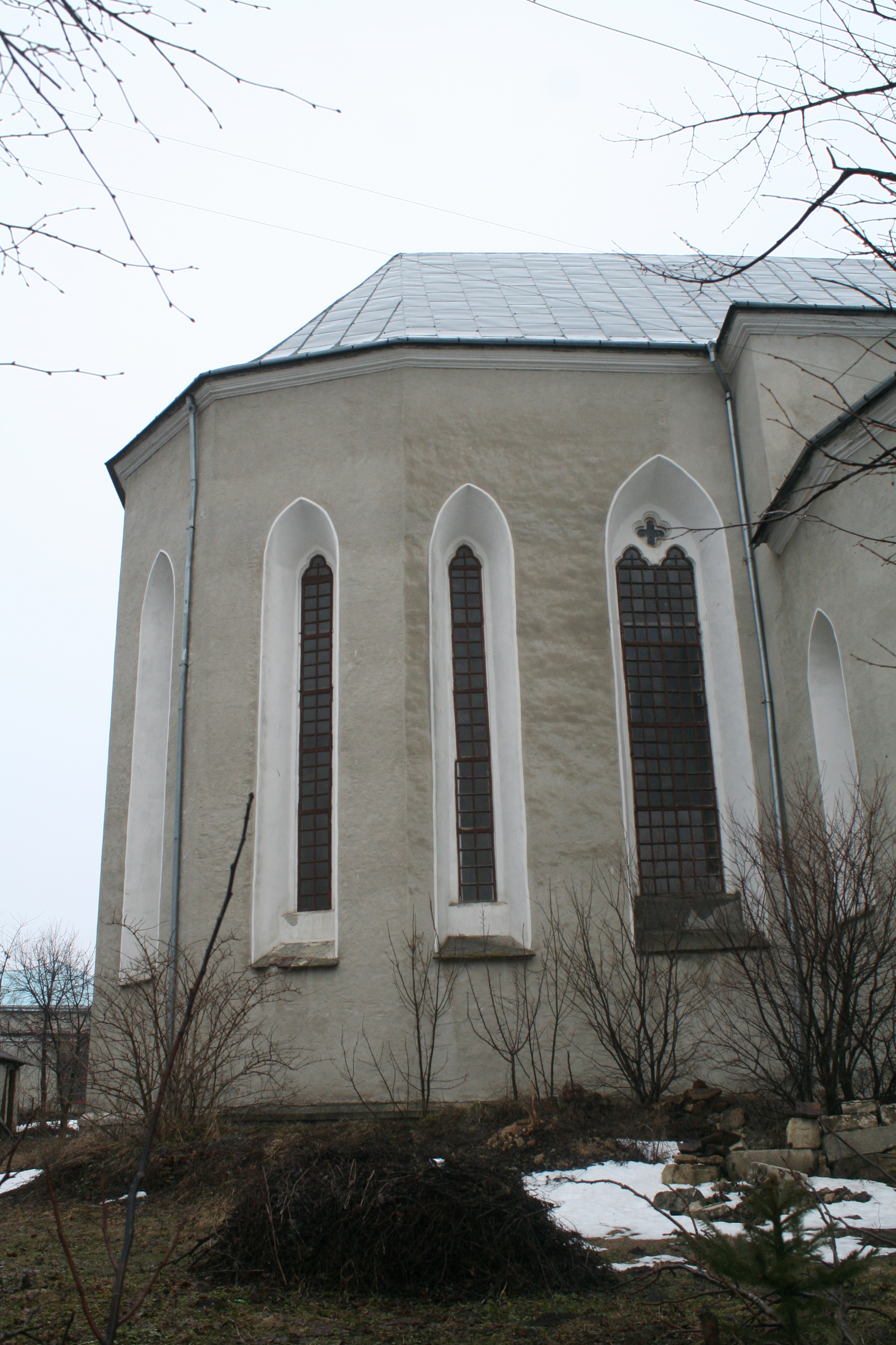 смт. Золотий Потік, Бучачцький р-он, Костел Різдва Пречистої Діви Марії і Святого Щепана першого мученика, фррагмент